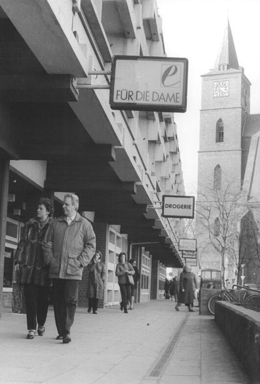 Bernau, Ernst-Thälmann-Straße, Passanten ADN-ZB Ritter 21.3.1986-zinBez. Frankfurt-Oder: Die Kreisstadt Bernau kann auf eine eindrucksvolle Bilanz in der Bürgerinitiative "Schöner unsere Städte und Gemeinden-Mach mit" in Vorbereitung des II. Parteitages der SED verweisen. Günstige Einkaufsmöglichkeiten finden die Einwohner des rund 20000 Einwohner zählenden Ortes in der Ernst-Thälmann-Straße vor. -Siehe auch Motiv 1986-0321-25 N- Information added by Wikimedia users.Die Plattenbauten sind vom speziell für Bernau entwickeltem Typ WBR SL 3600, entwickelt vom WGK Frankfurt (Oder). Die Plattenbauten wurden ab 1974 geplant und entwickelt und 1985 fertiggestellt. Das Bild zeigt links das sogenannte Laubenganghaus (Ladenstraße mit 3 Obergeschossen Wohnungen. Es entstanden 138 1-Zi-Wohnungen und 3 3-Zi-Wohnungen).